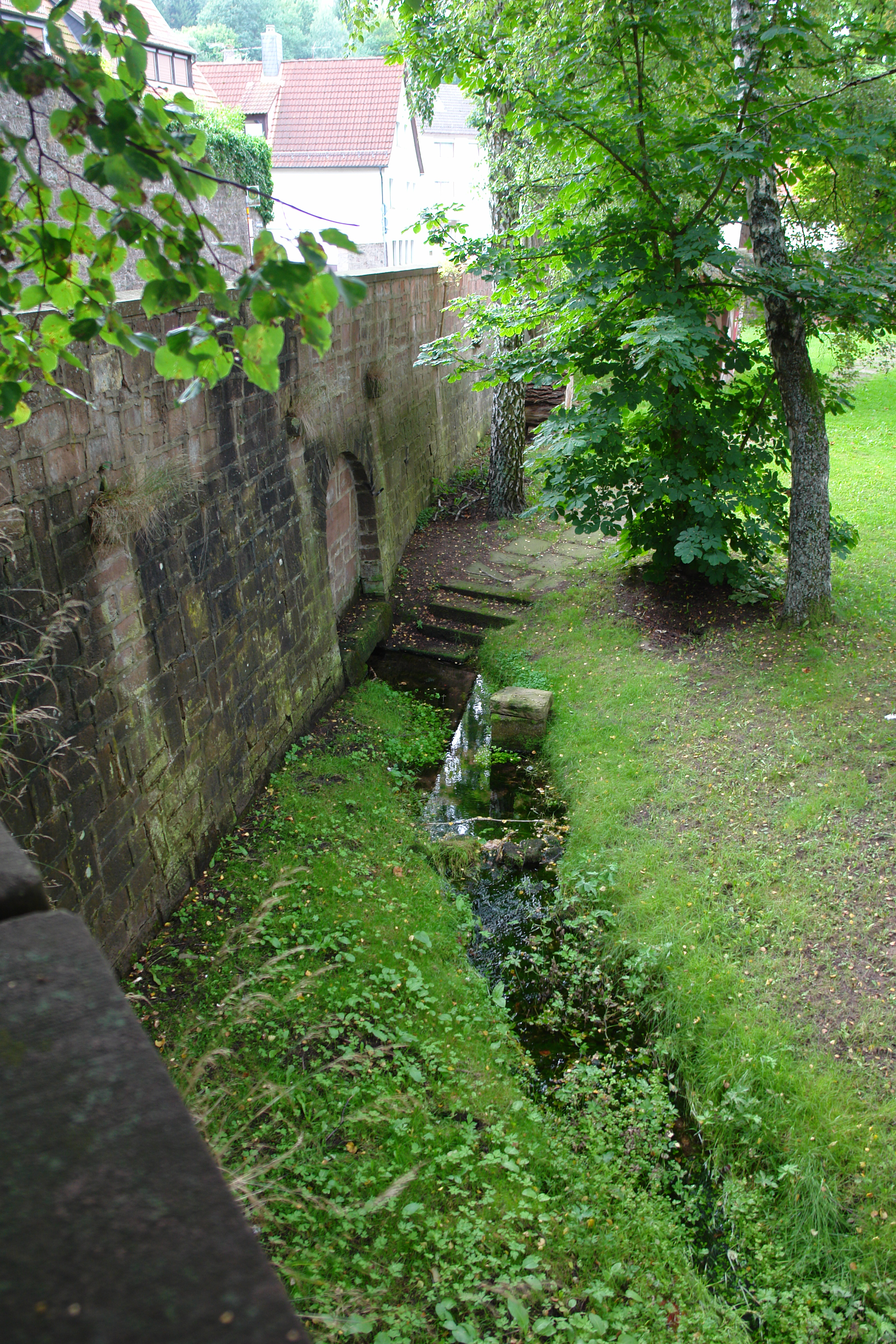 Hafenlohr Quelle in Rothenbuch am Schloss